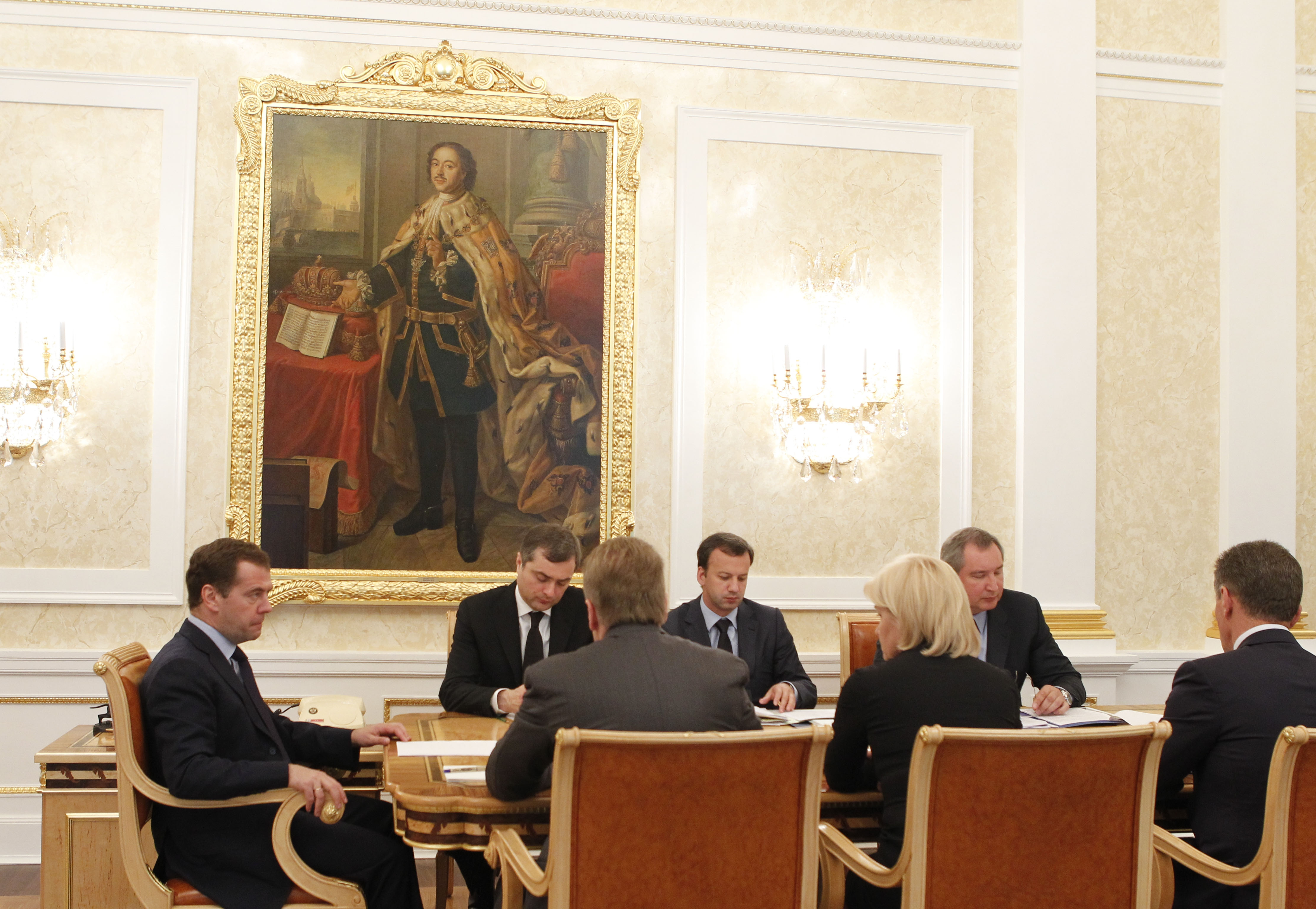 Председатель Правительства Российской Федерации Дмитрий Медведев провёл совещание со своими заместителями по вопросам, связанным с трагическими событиями в Краснодарском крае и на Украине